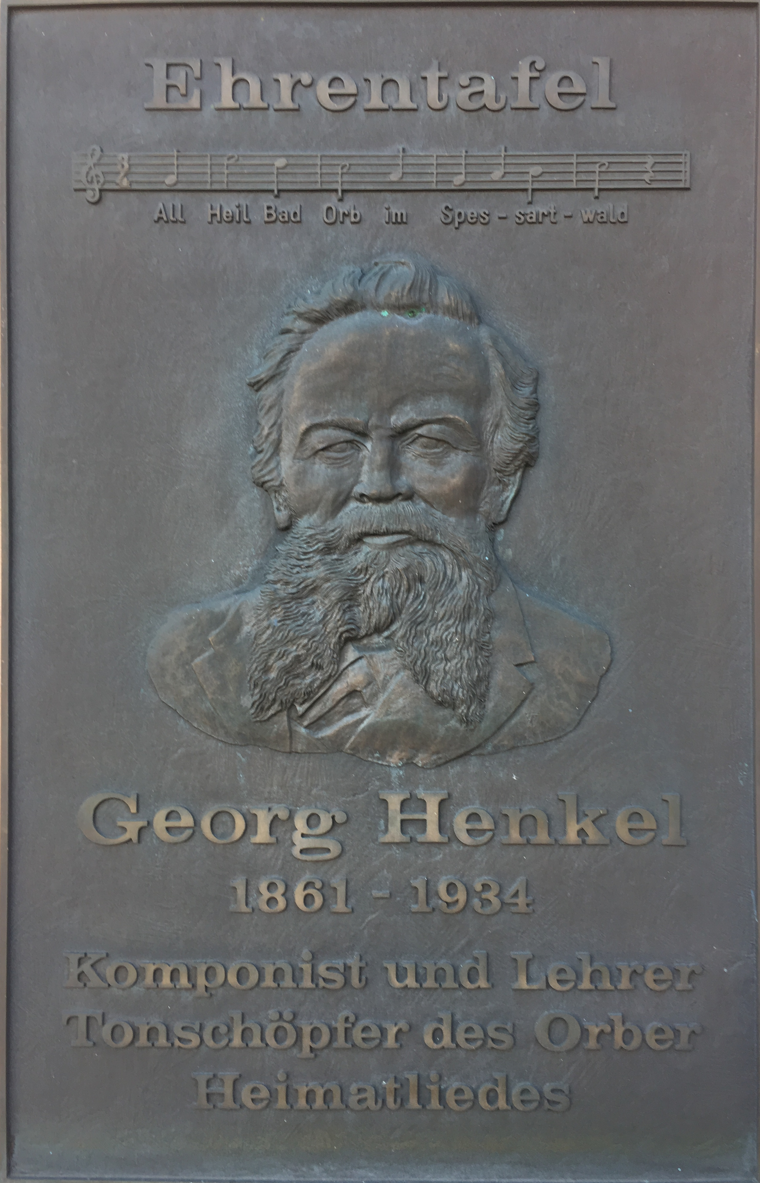 Ehrentafel für den Komponisten Georg Wilhelm Henkel am Heimatmuseum Bad Orb